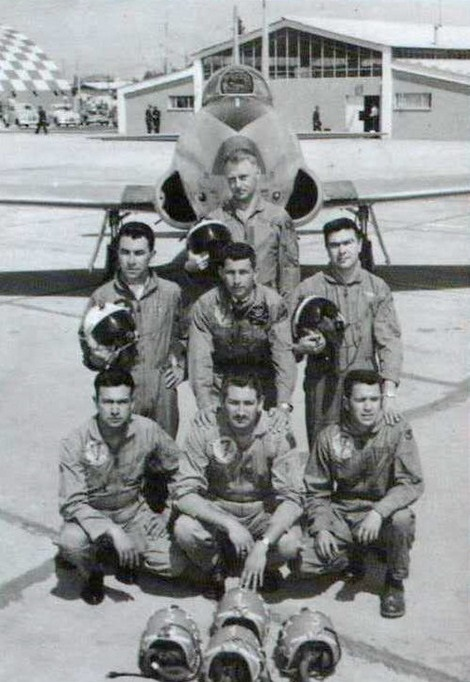 Condores de Plata Chile FACH